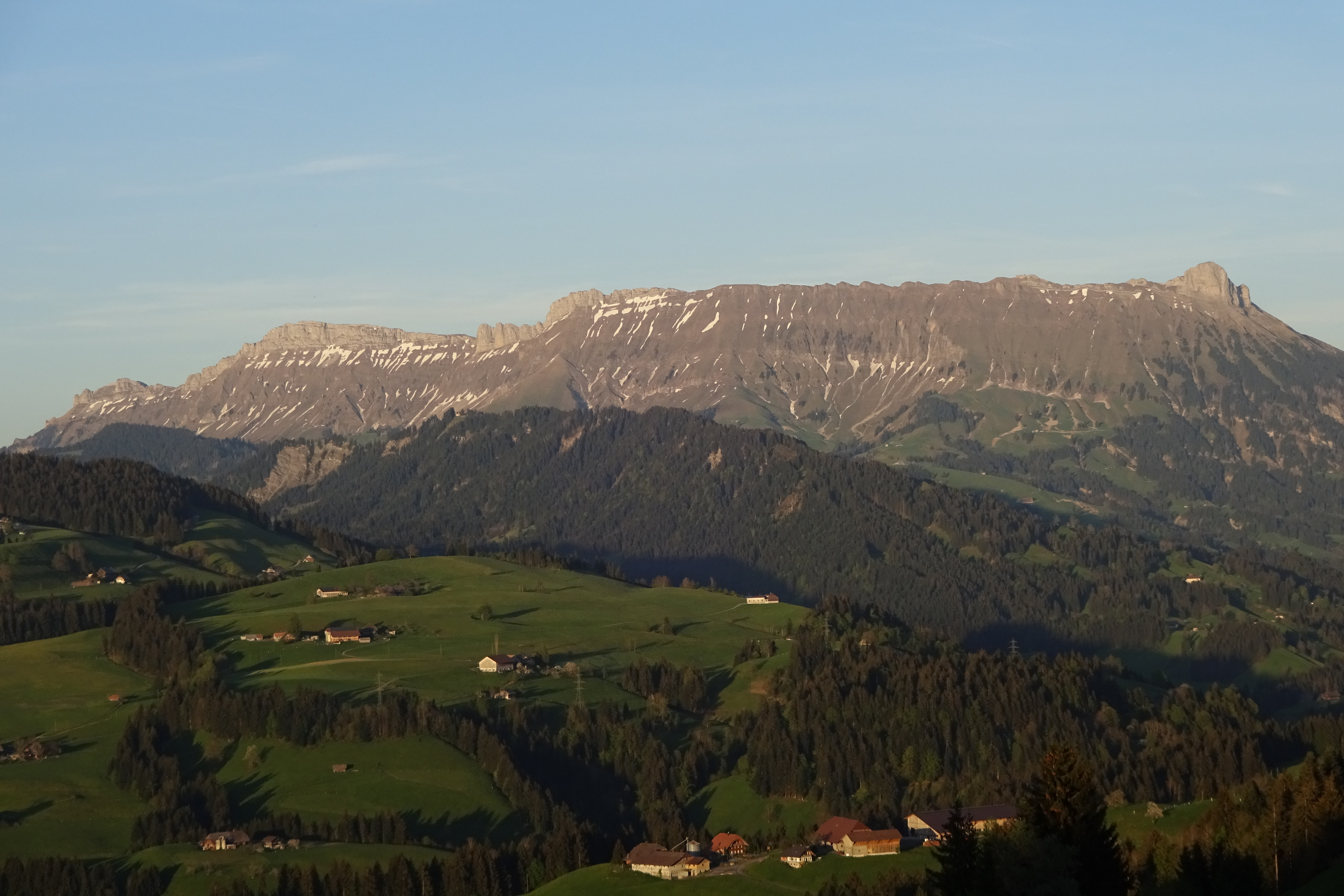 UNESCO Biosphäre Entlebuch (Nr. 1010P) – Schrattenfluh-Nordwestflanke: Strick (ganz links), Hächlen (links), Hengst (Mitte) & Schybengütsch (rechts) _ Aufnahmestandort: Schallenberg, ~ 50 m nordwestlich von Passhöhe, an Gemeindegrenze Eggiwil-Röthenbach im Emmental – 46°49'35.40" N / 7°47'48.53" O